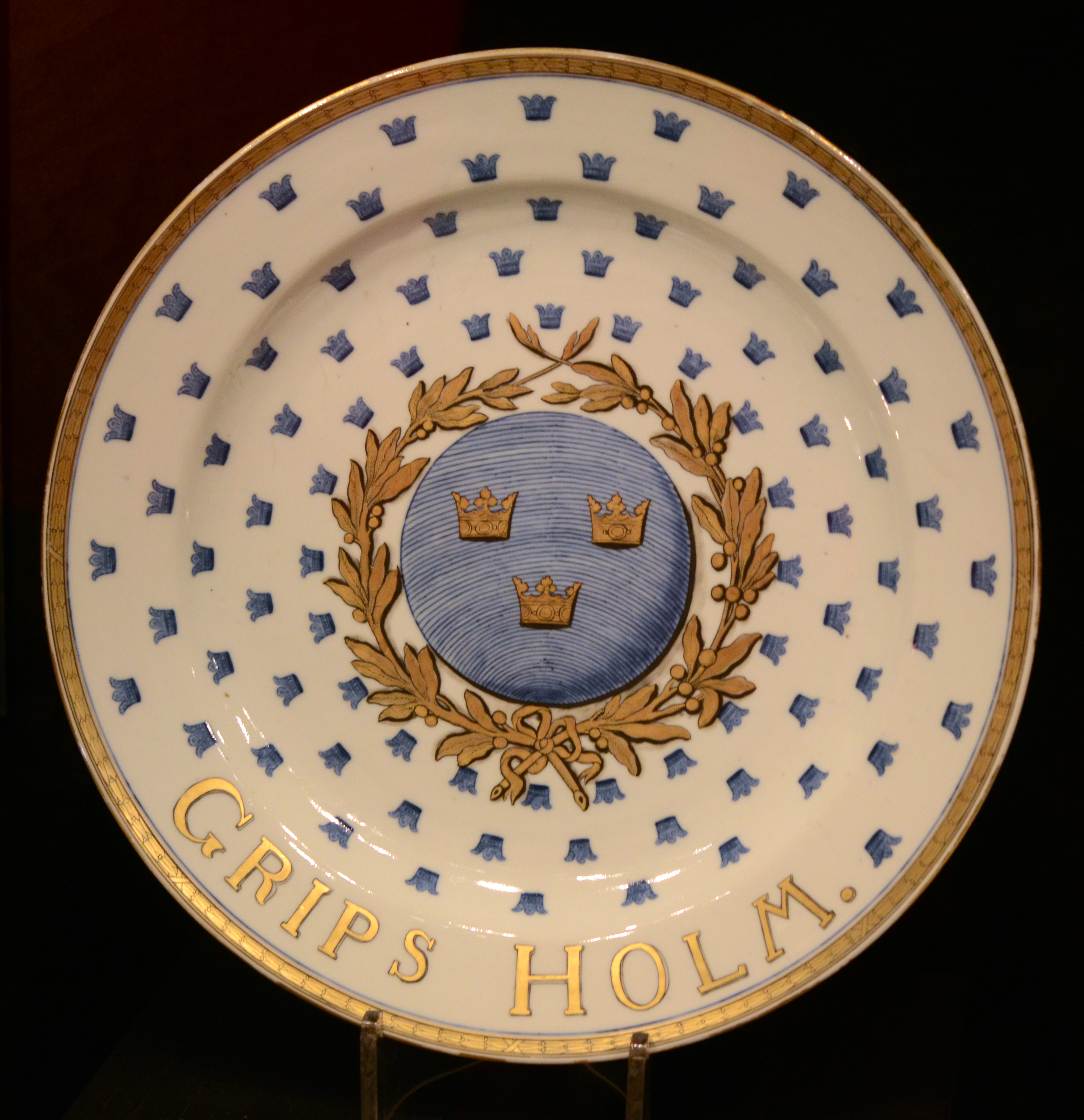 En av de pampigaste serviserna som importerades till Sverige genom Svenska Ostindiska Kompaniet var Gripsholmsservisen. Den lär ha varit en gåva till Gustav III av kompaniets direktion. Servisen omtalas i inventarier 1781 och 1798. This is a photo of an artwork at the Museum of Far Eastern Antiquities in Sweden with the identifier: NM-1940-0235